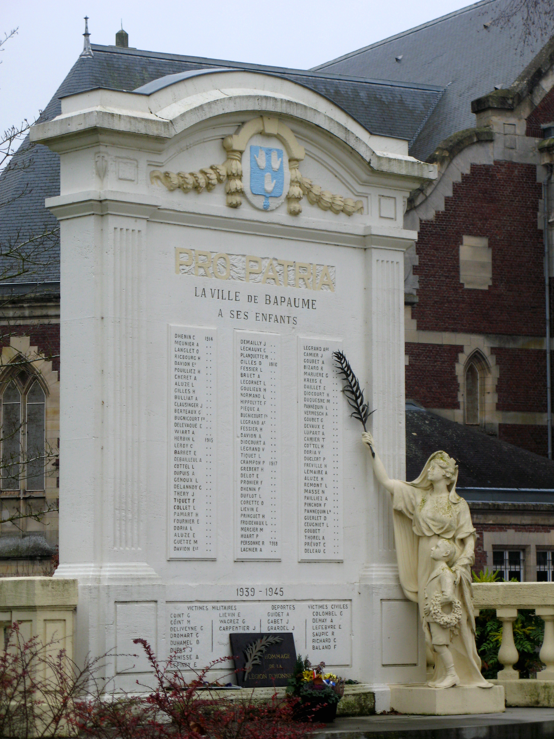 Bapaume (Pas-de-Calais, France) - Le monument-aux-morts et (en arrière-plan) l'église Saint-Nicolas. .